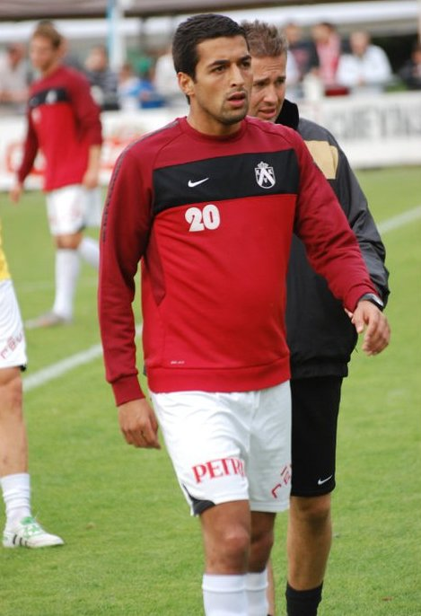 Mohamed Messoudi; A-kern speler KV Kortrijk 2011-2012